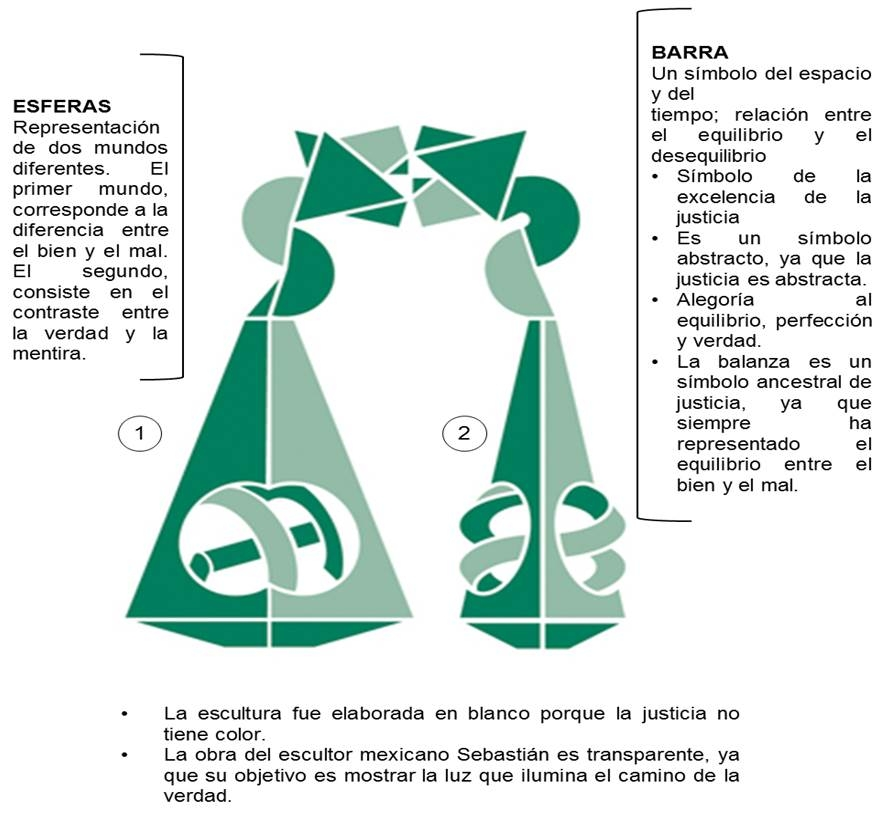 El logo del Tribunal electoral esta basado en la escultura del artista "Sebastian"